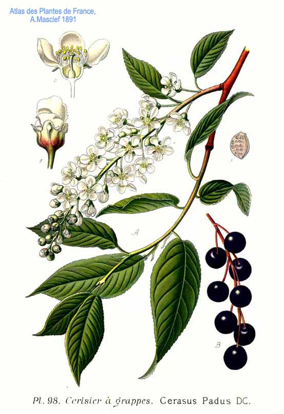 Prunus padus subsp. padus, syn. Cerasus padus DC.